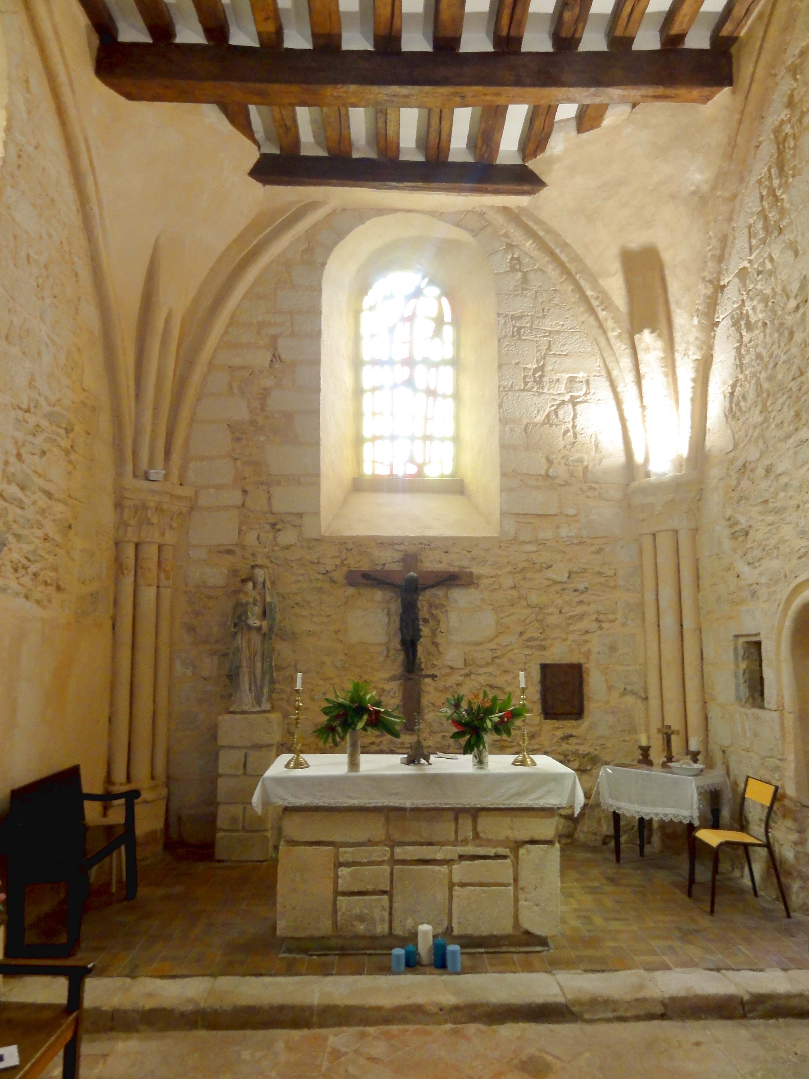 Intérieur de l'église - voir titre.